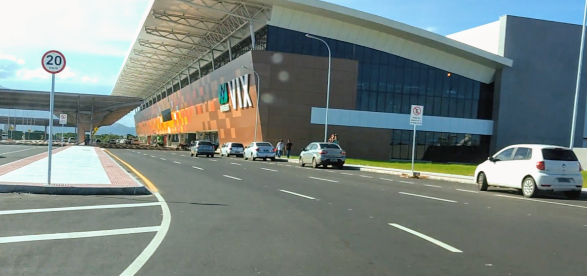 Novo terminal do Aeroporto de Vitória